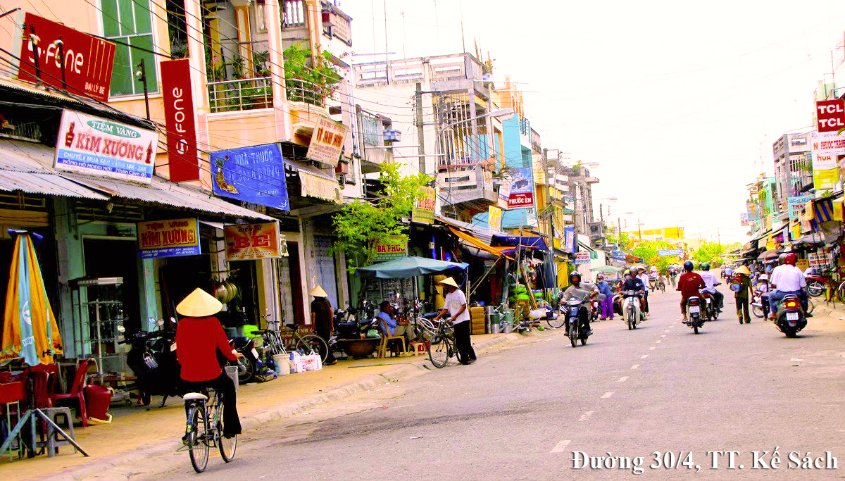 TT. Kế Sách